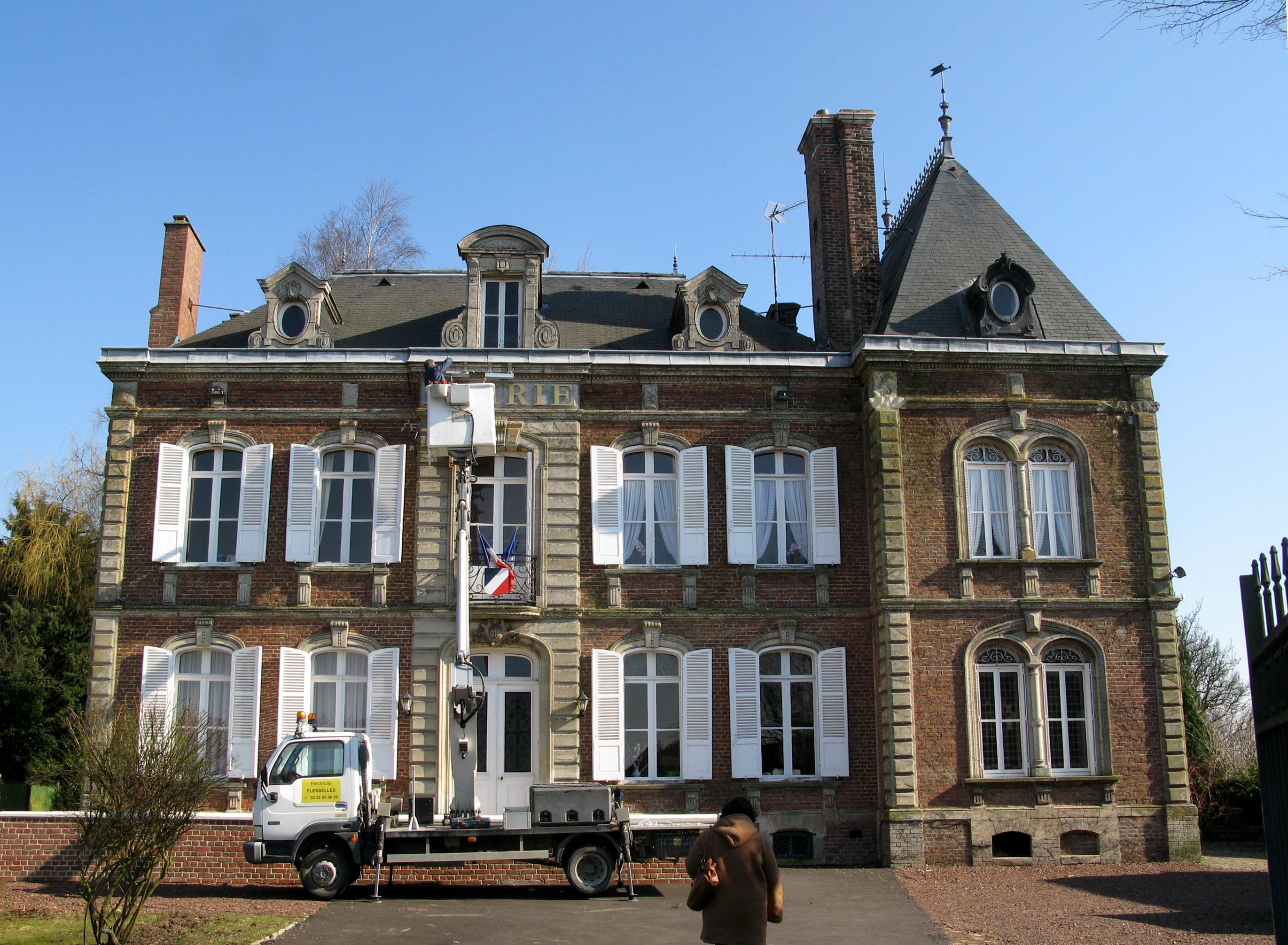 Flesselles (Somme, France) - La mairie, caractérisée par l'élégance de l'encadrement de sa porte et de ses fenêtres. .